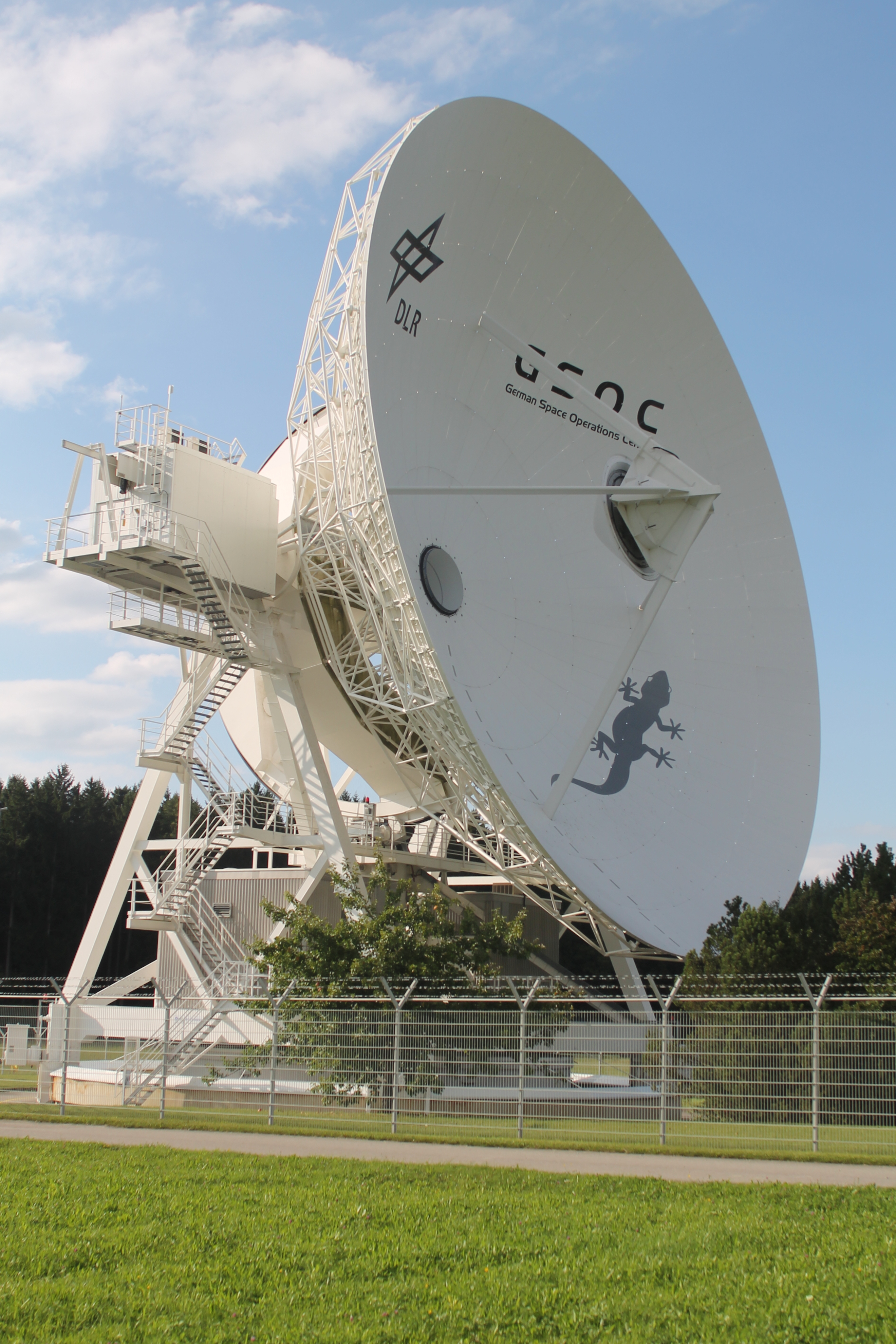 Grosse Antenne der Bodenstation Weilheim in Oberbayern